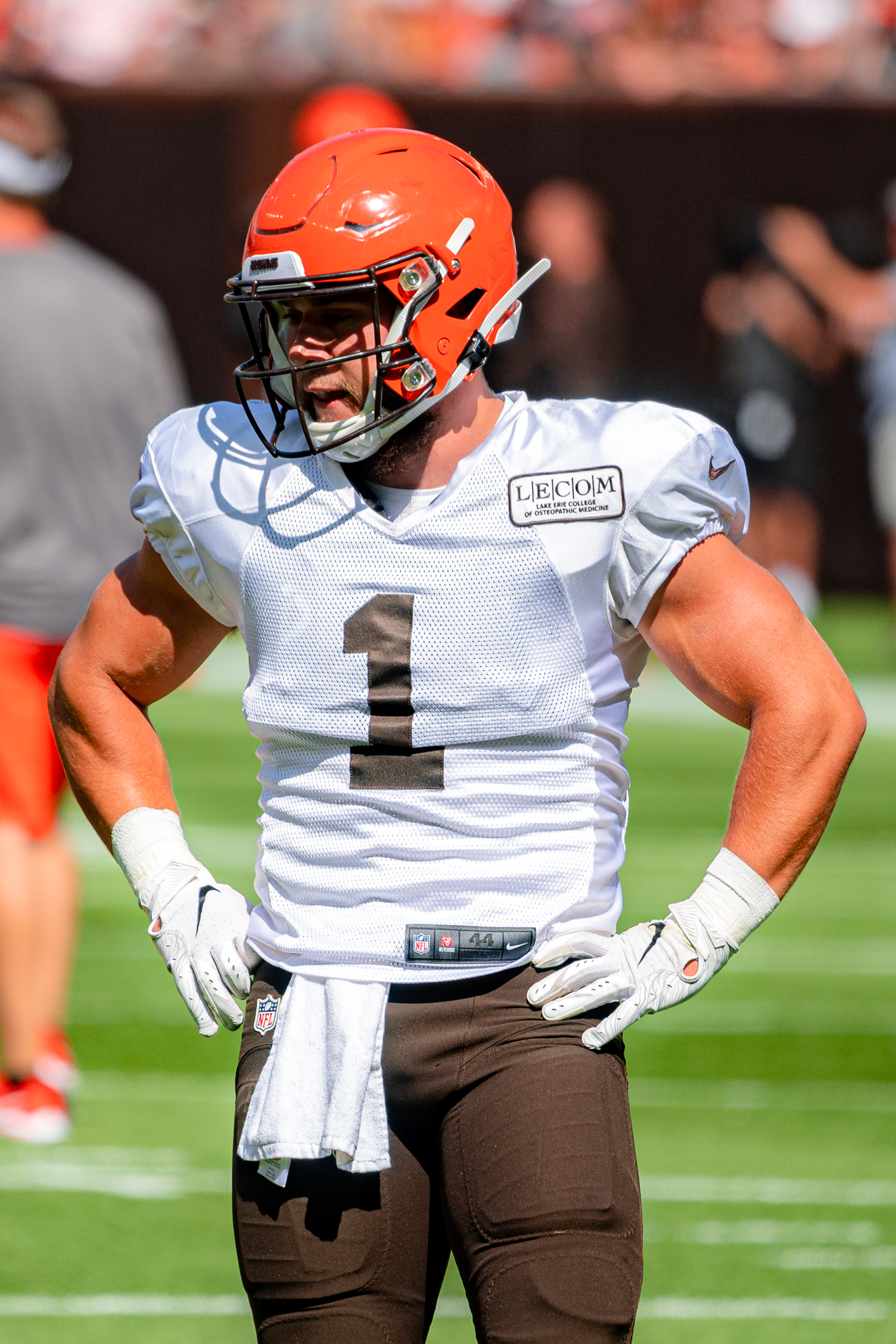 A.J. Ouellette